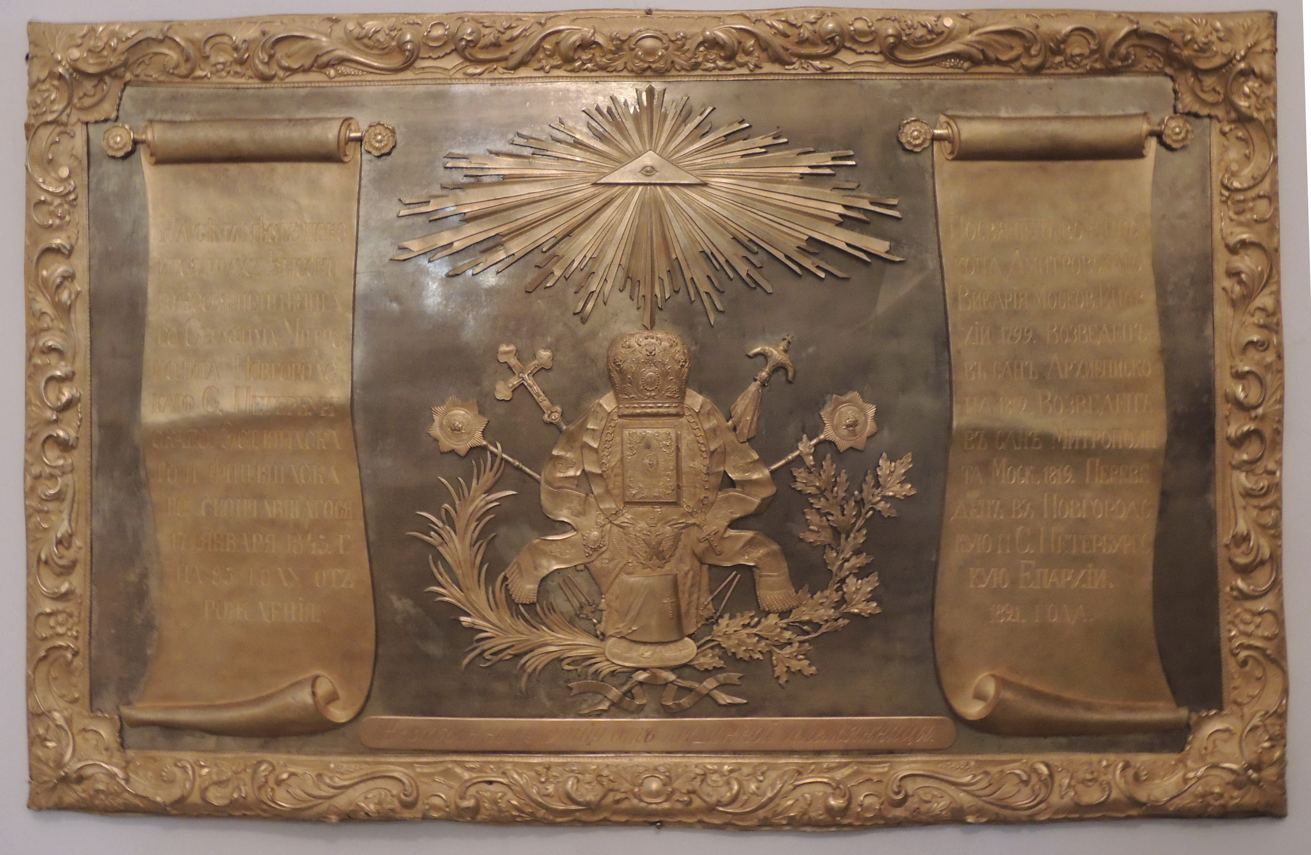 Благовещенская церковь Александро-Невской лавры. Серафим (Глаголевский) (1763—1843). Доска с эпитафией. Мастер И. Е. Шумилов, 1843. Бронза золоченая. Перенесена из Духовской церкви в 1937 г.